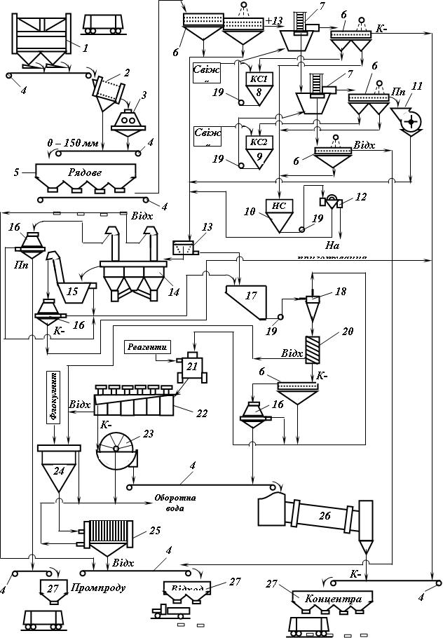 Схема